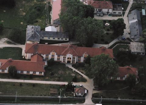 Győrtelek, Hungary, aerialphotography